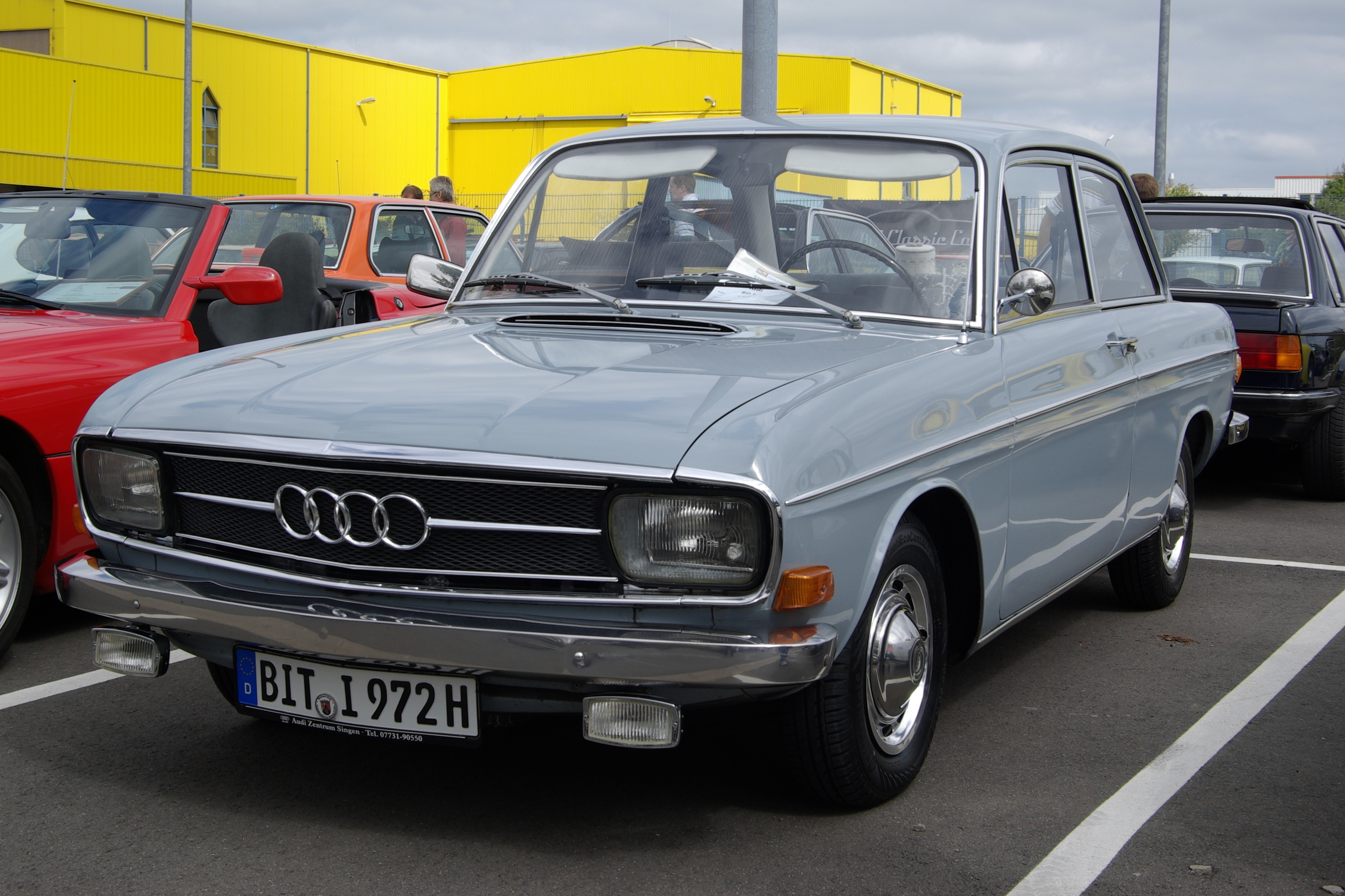 Audi 60 L, Baujahr 1972, 1500 cm³, 4 Zyl., 55 PS, Bitburg Classic 2012